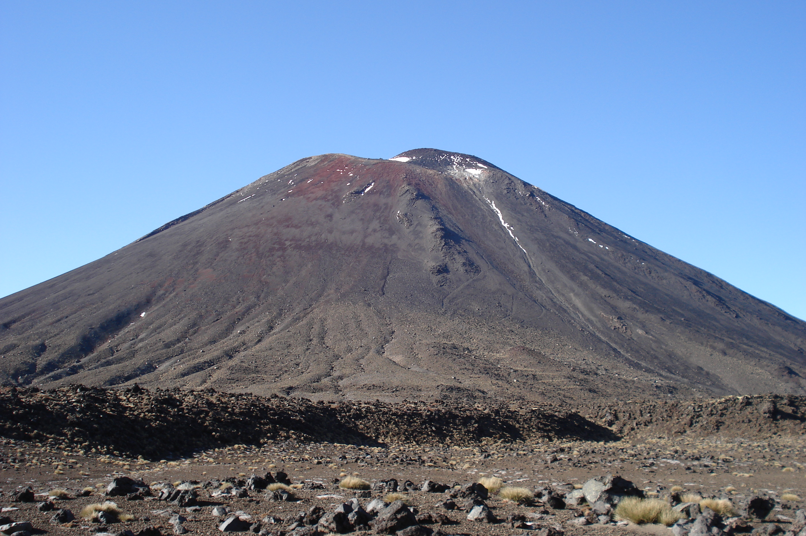 Mt. Ngauruhoe